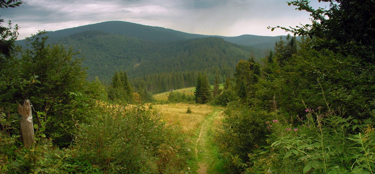 Widok na przełęcz Głuchaczki ze stoków Jaworzyny